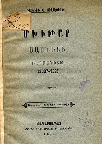 Обложка первого издания книги Мхитара Саснеци, 1899 год